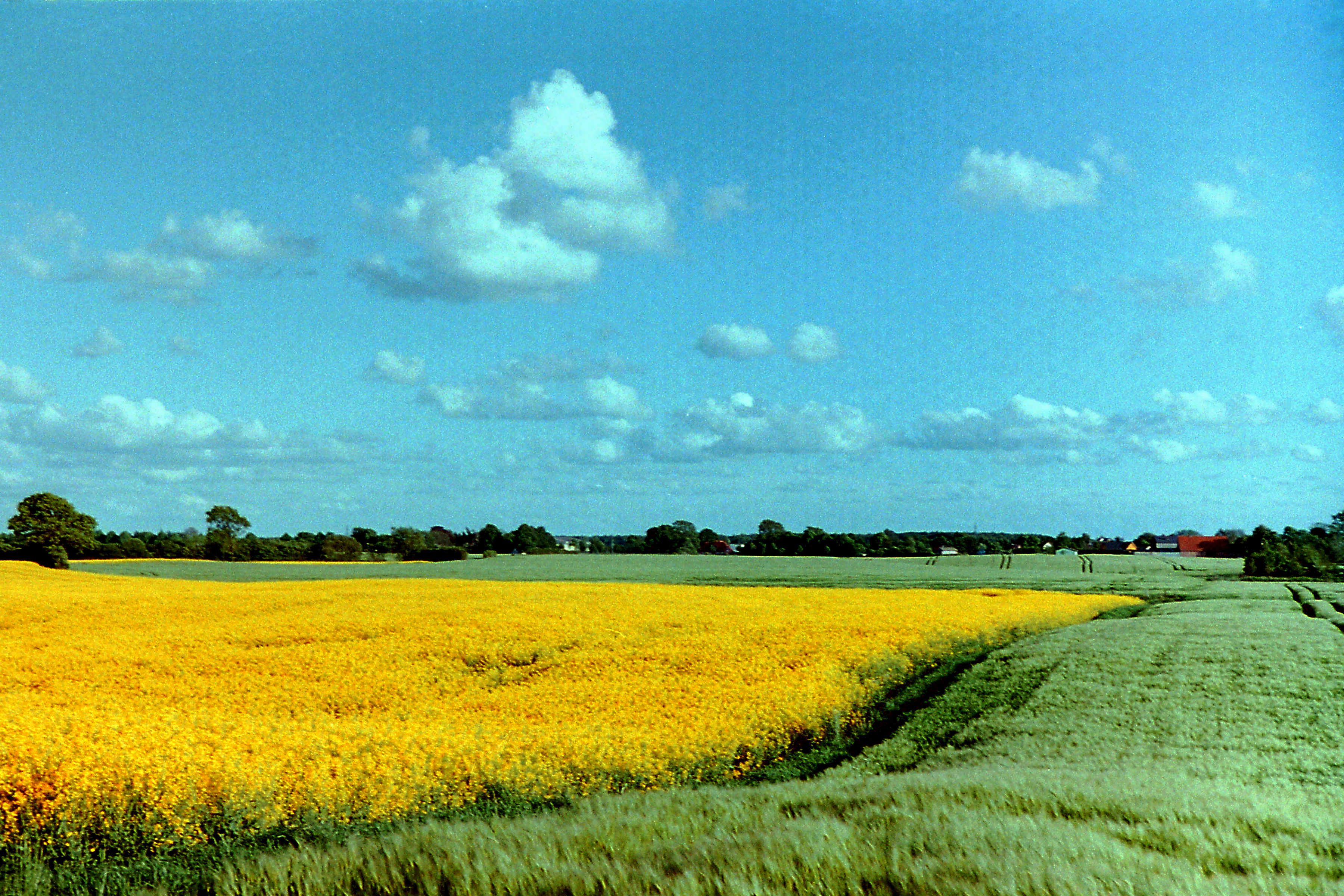 Raps- und Getreidefelder nördlich von Bredenbek. Im Hintergrund sind Gebäude des Dorfes zu erkennen.